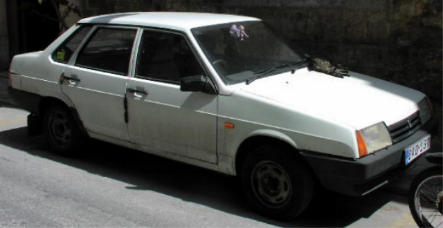 Lada Samara sedan